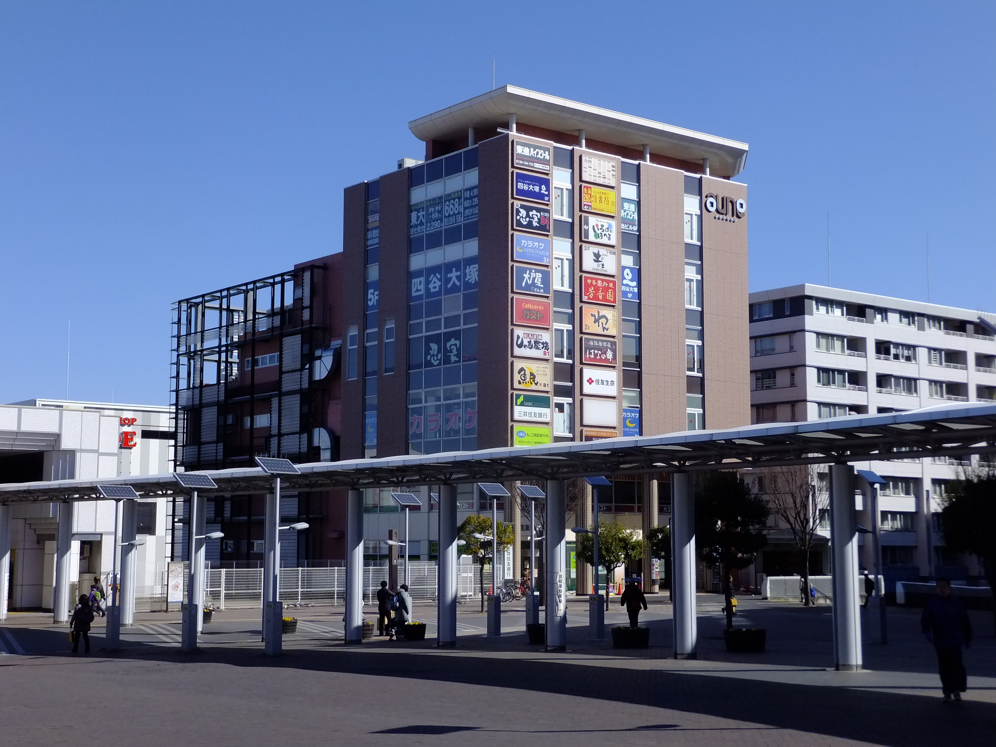 横浜市営地下鉄・センター南駅前の商業施設「aune 港北（アウネ港北）」（横浜市都筑区）